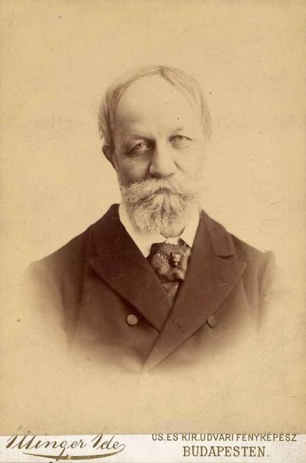 Jókai Mór (1825-1904) író kb. 70 éves korában